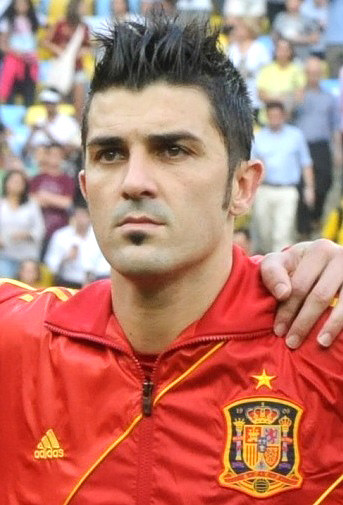 Espanha e Taiti se enfrentam na Copa das Confederações 2013